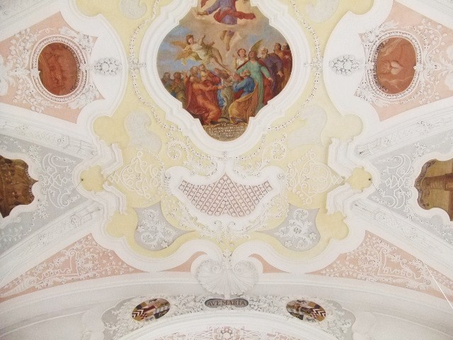 Spitalkirche Mariä Himmelfahrt, Gundelfingen an der Donau Stuck an der Decke